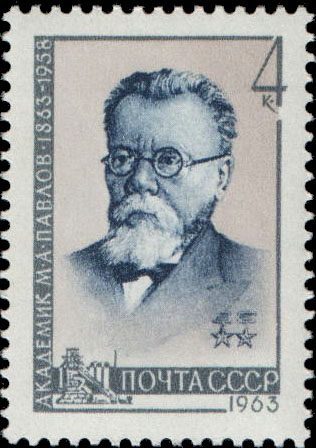 Почтовая марка СССР - Павлов Михаил Александрович, Герой Социалистического Труда